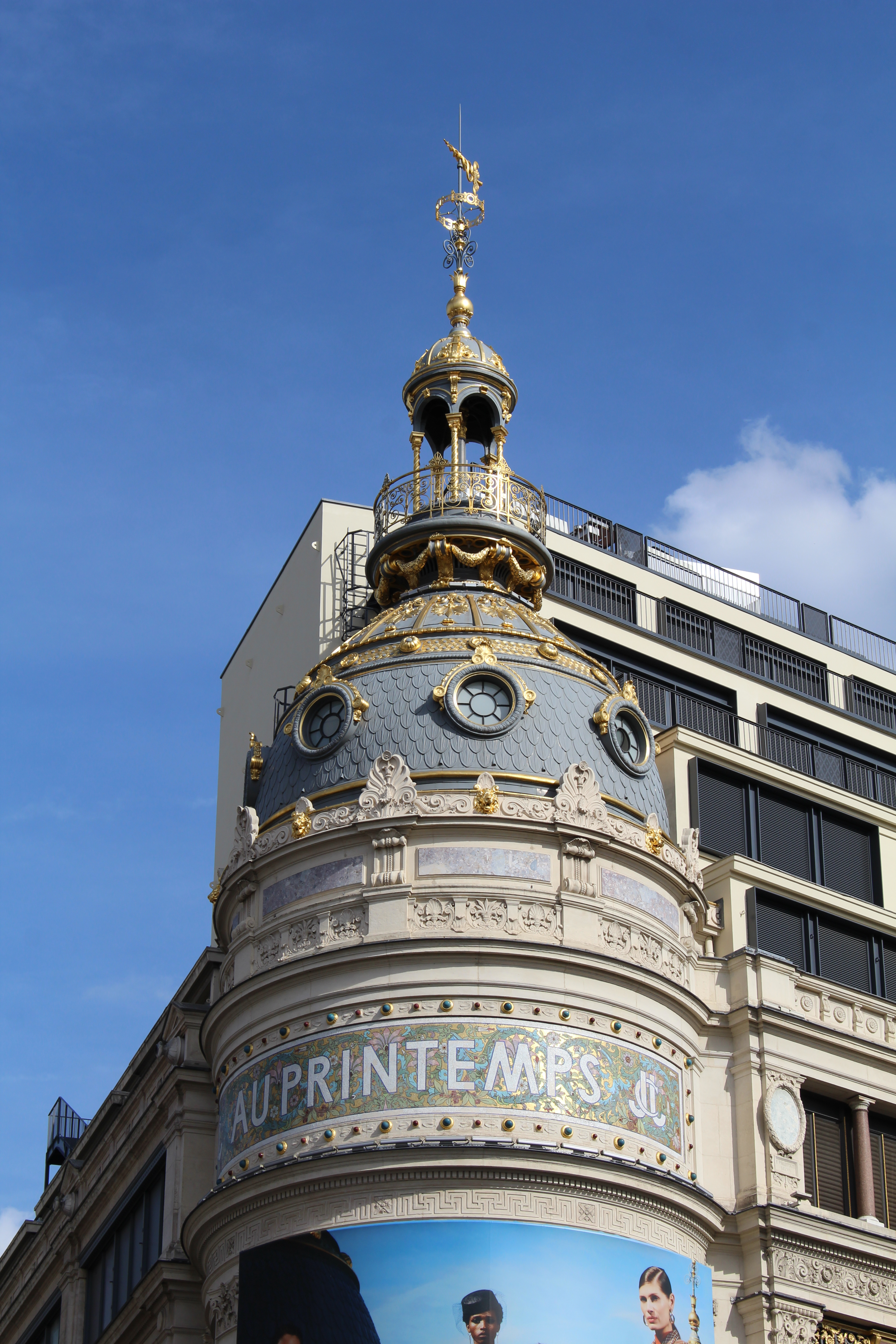 Magasin Printemps Haussmann, 64-70 boulevard Haussmann, Paris.